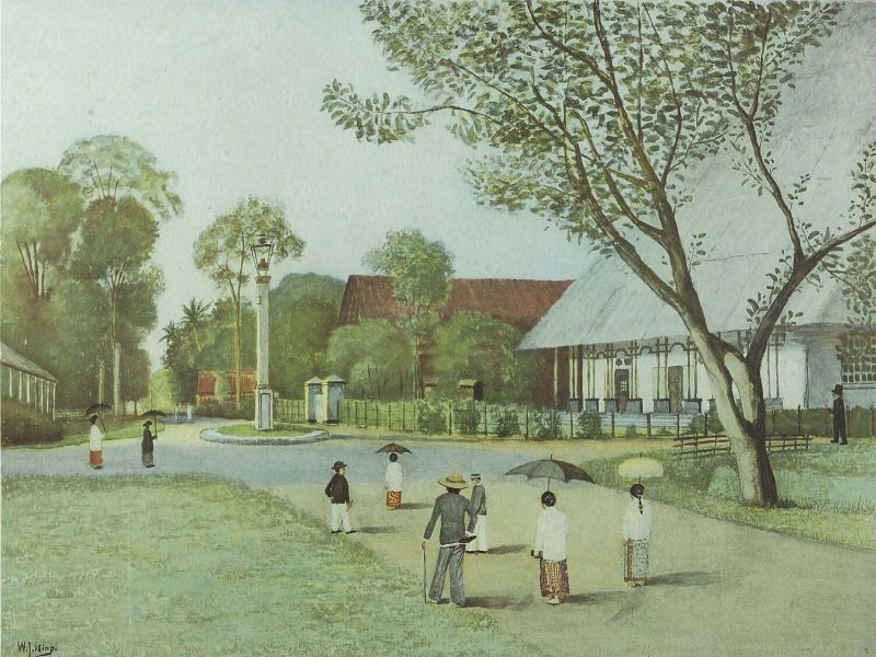 Schoolplaat. De plaat is gemaakt naar een aquarel van W.J.Ising (1911). Het is no 11 uit de serie Zondervan.. De Minahassa in Celebes